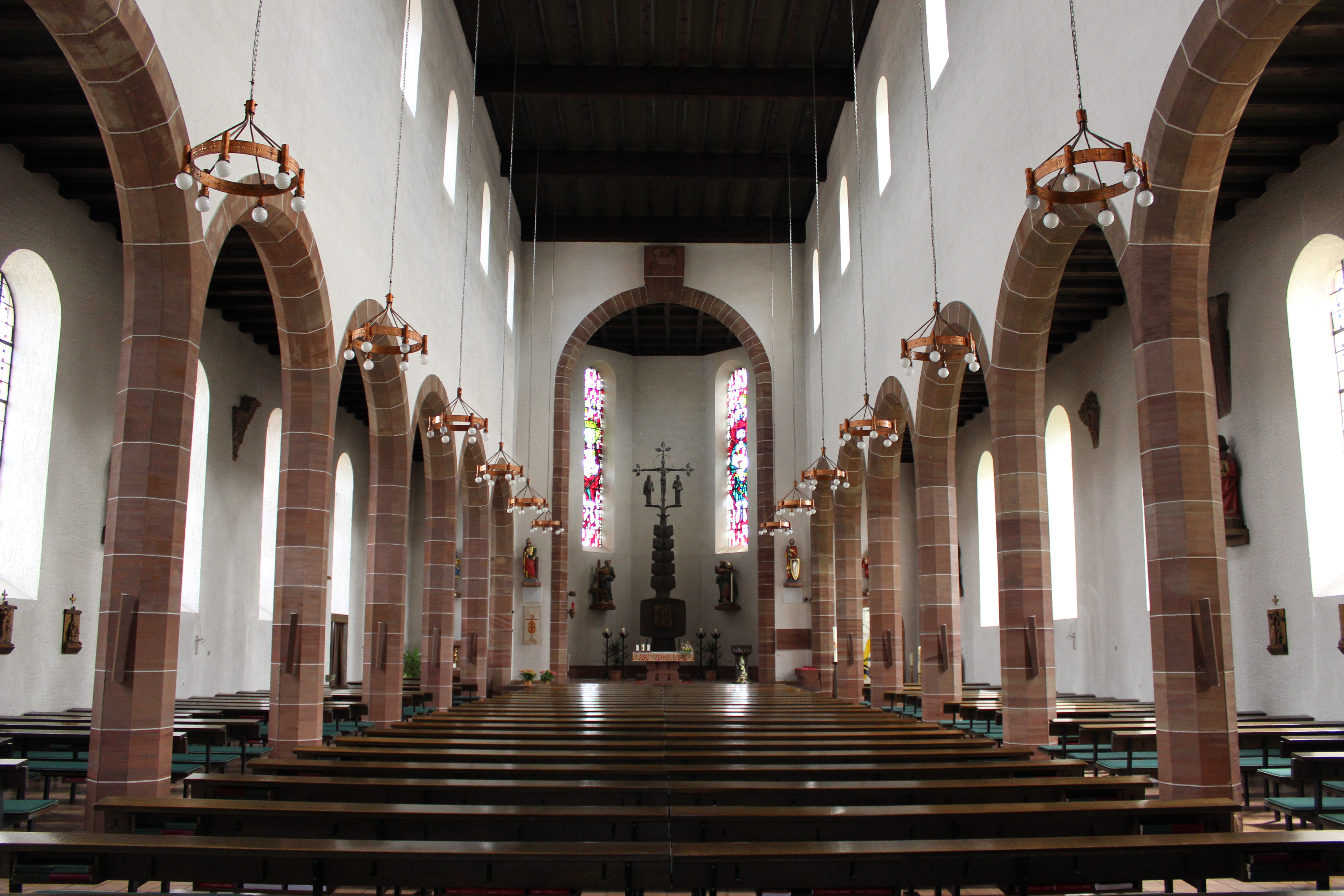 Blick ins Innere der katholischen Pfarrkirche St. Peter und Paul in Losheim, Gemeinde Losheim am See, Landkreis Merzig-Wadern, Saarland